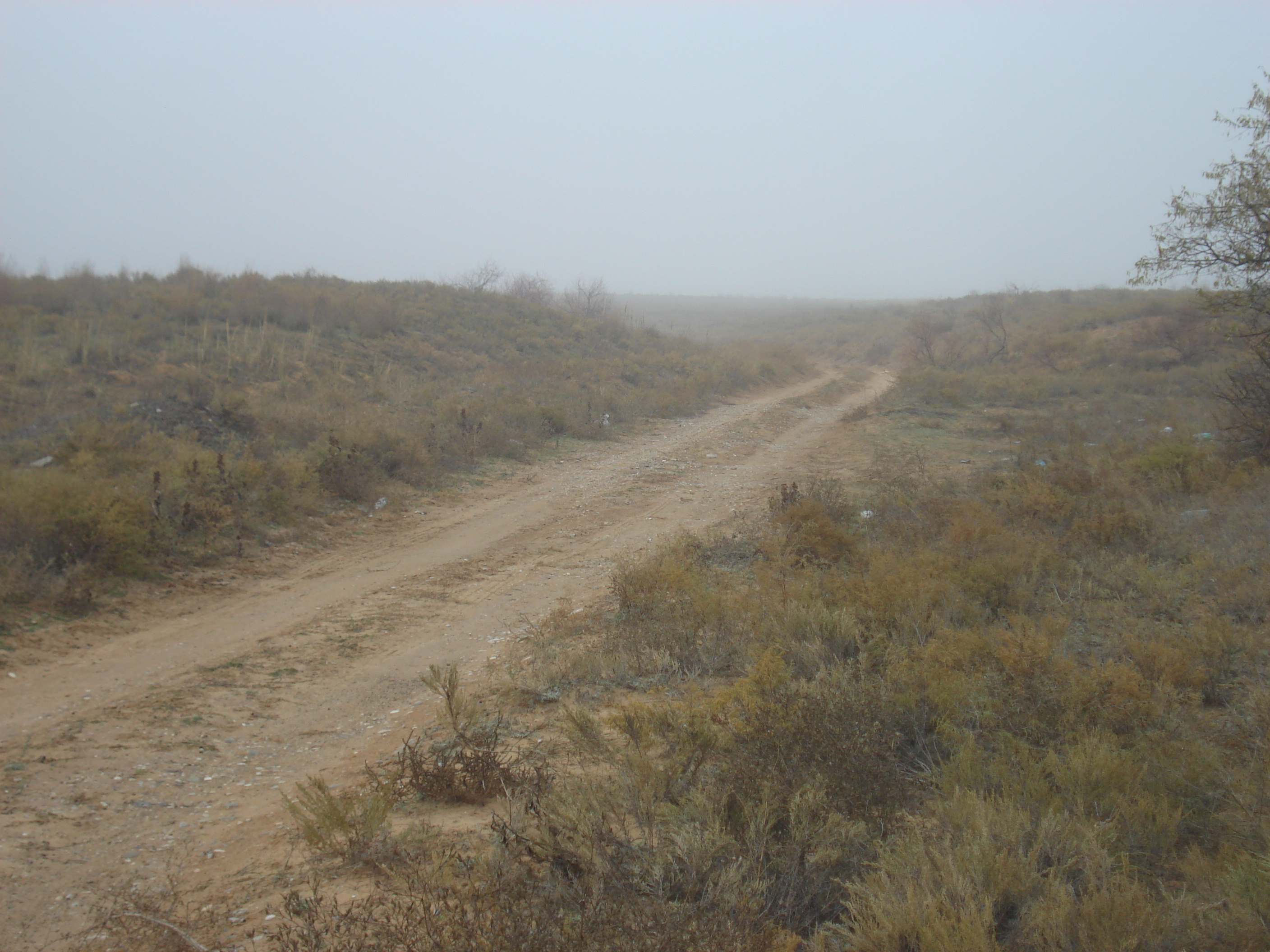 Калмыцкая полупустыня